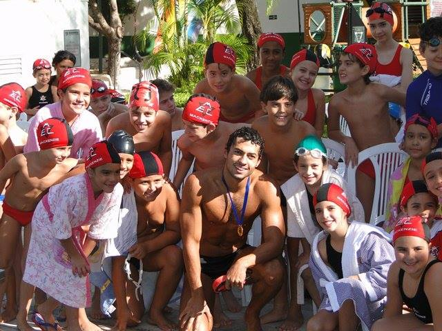 Ítalo Manzine e pequenos nadadores do Mackenzie BH